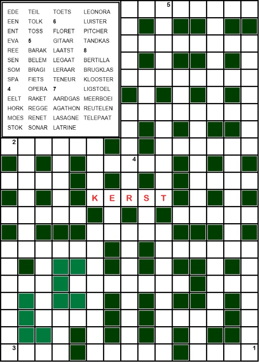 Legpuzzel VDM met het woord kerst.